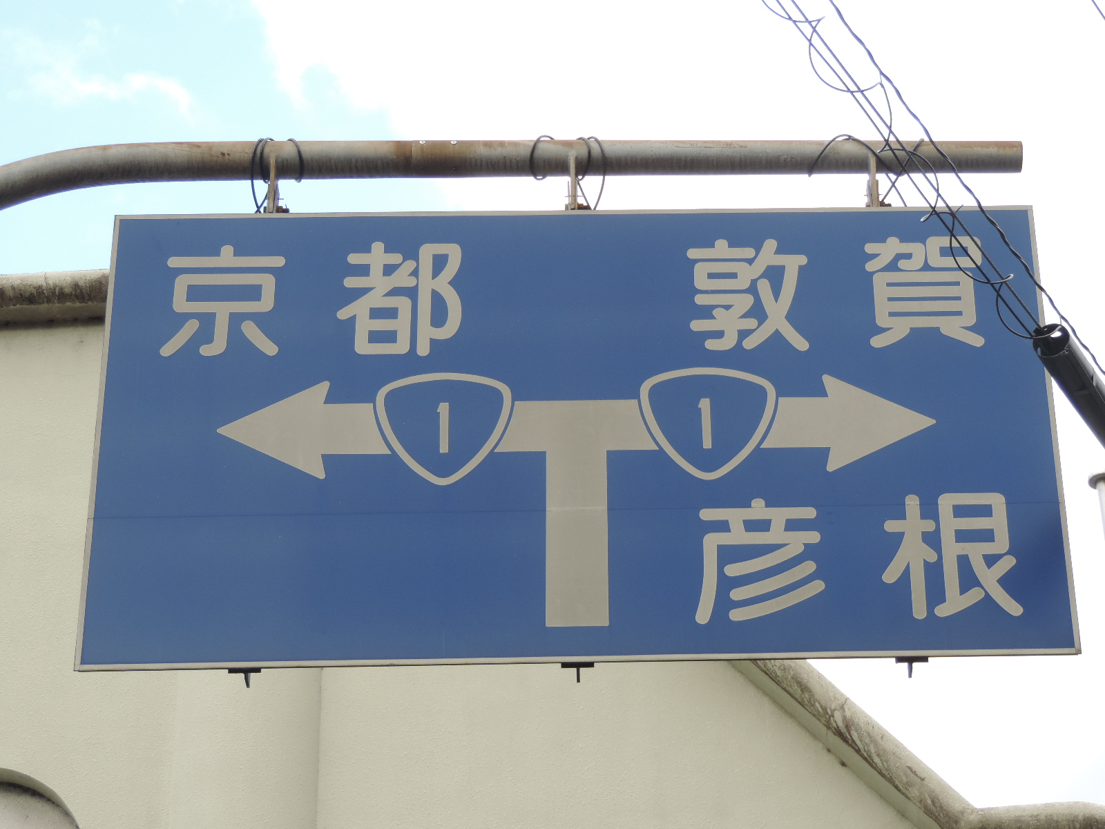 1971年（昭和41年）から1986年（昭和61年）まで用いられていた英字併記が無い案内標識（滋賀県大津市）